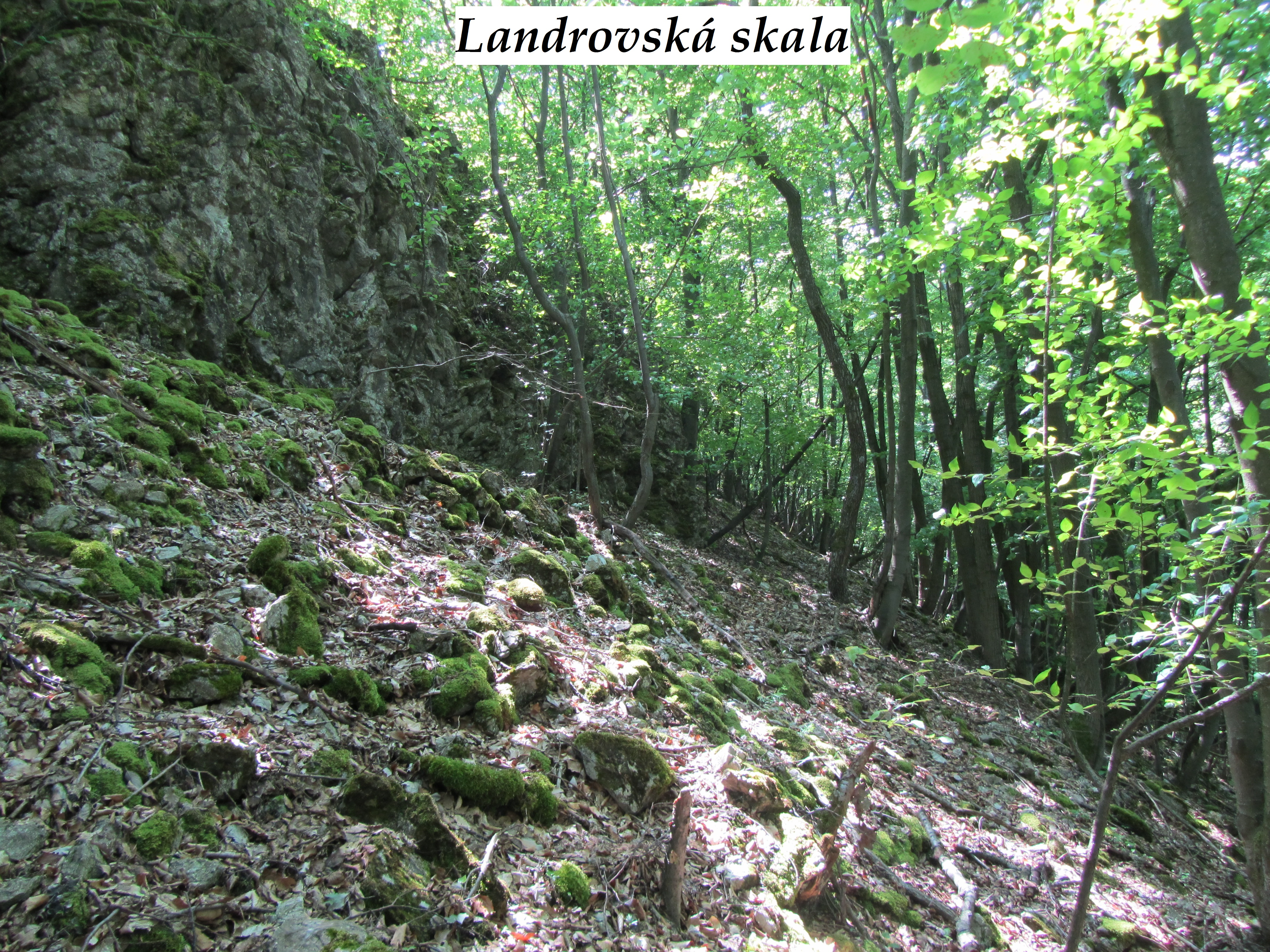 Landrovská skala v k.ú. Nová Bošáca